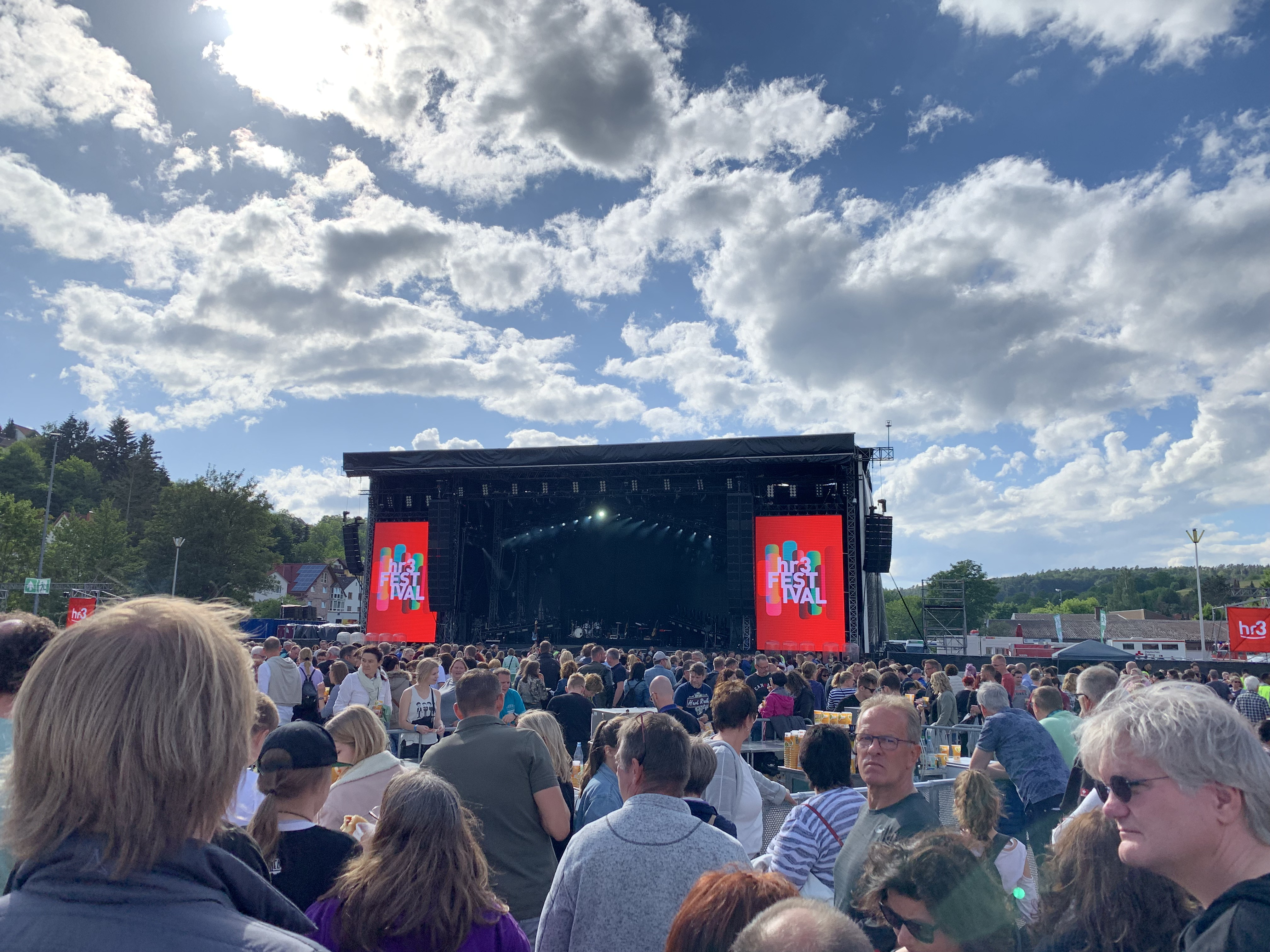 Hessentagsarena 2019 während des HR3-Festivals